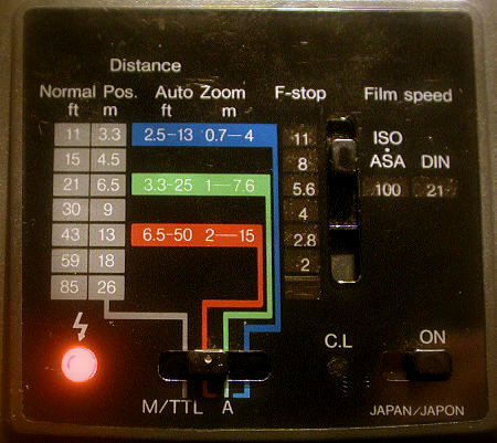 Dos d'un flash et ses graduations Auteur , photographie personnelle. 7 novembre 2006